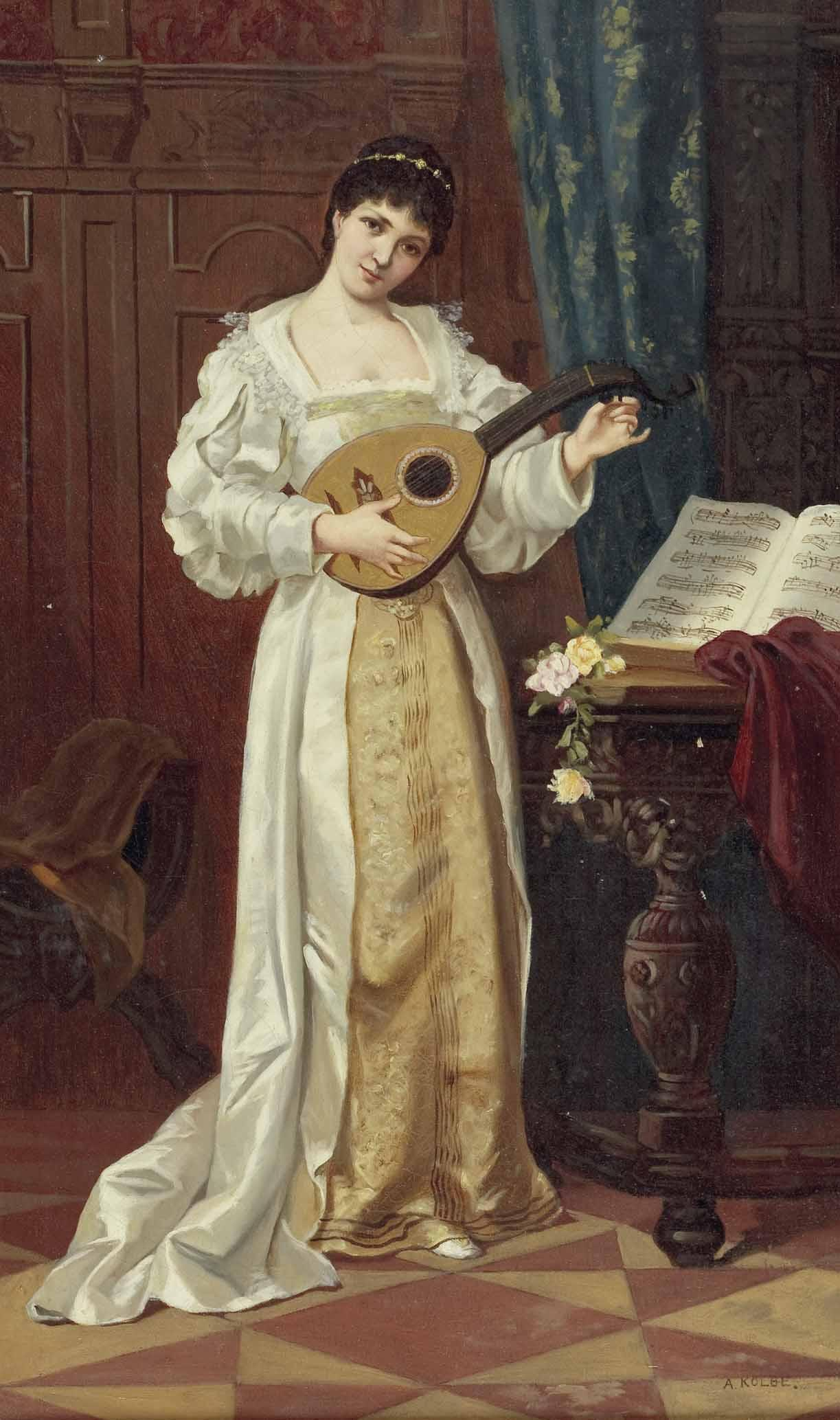 Dame beim Stimmen der Lautetitle QS:P1476,de:"Dame beim Stimmen der Laute" label QS:Lde,"Dame beim Stimmen der Laute"